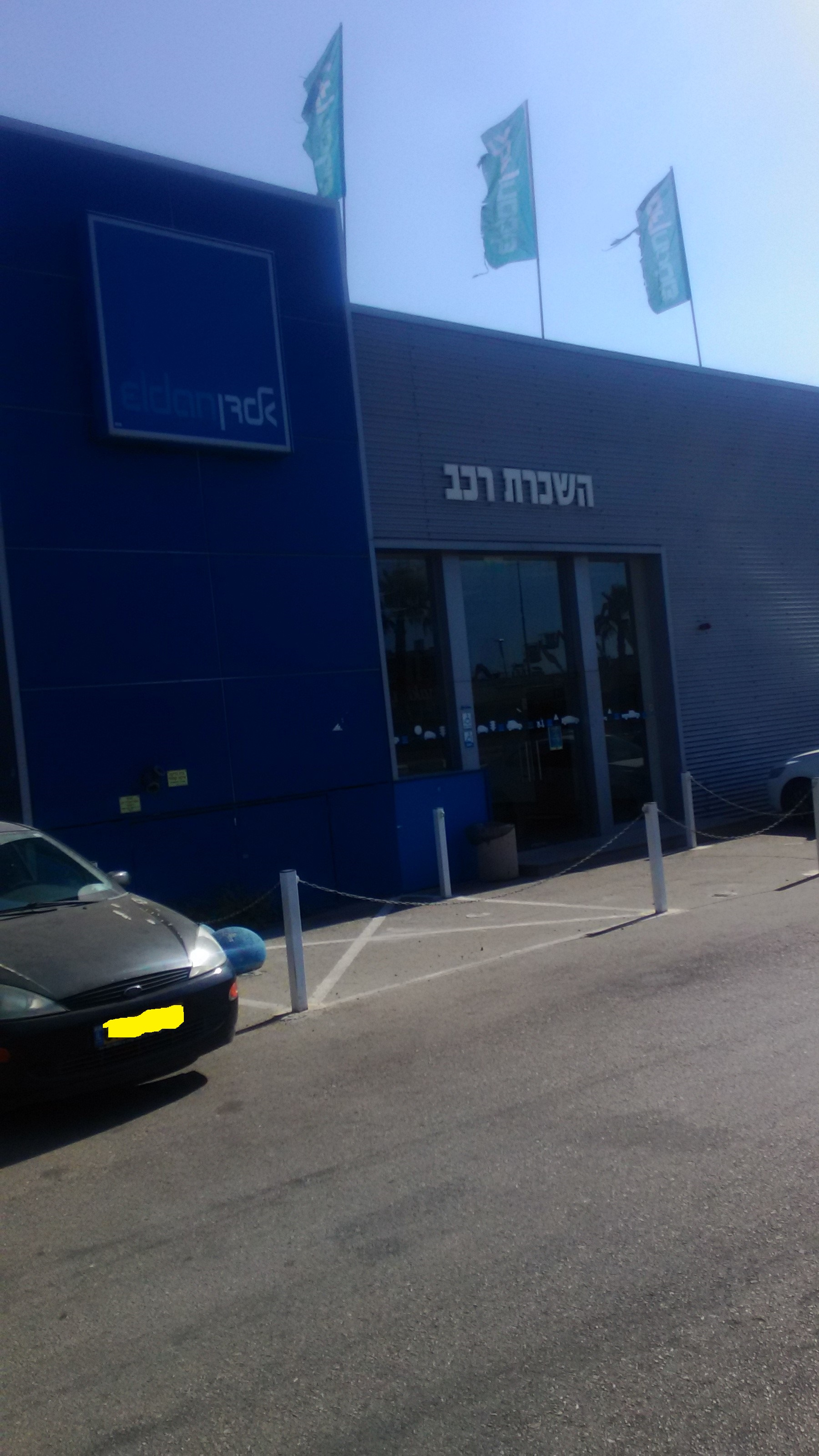 סניף אלדן